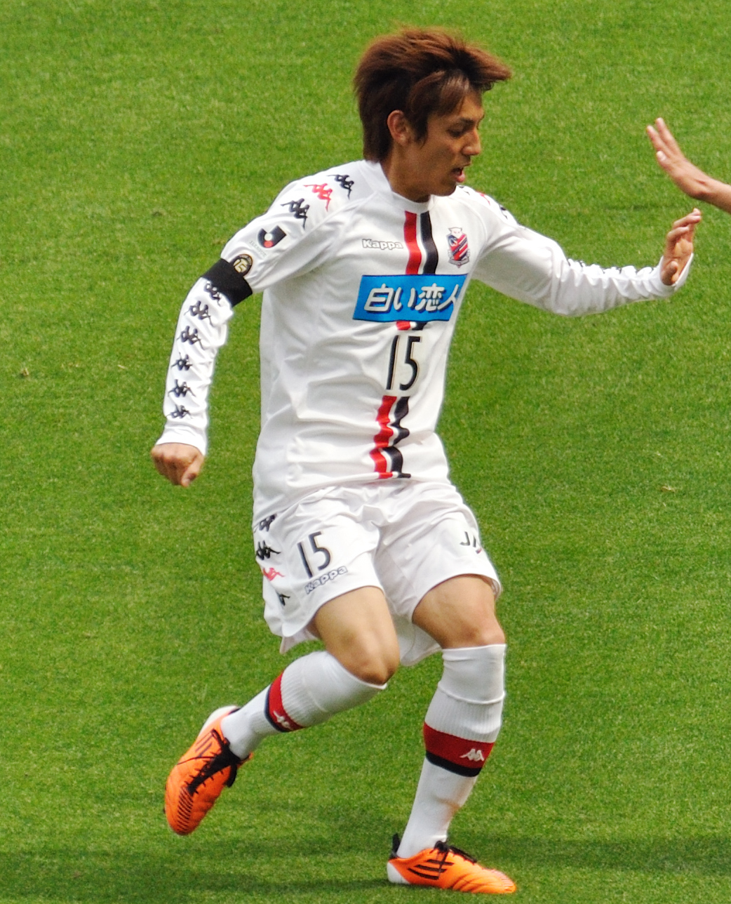 Hiroyuki Furuta